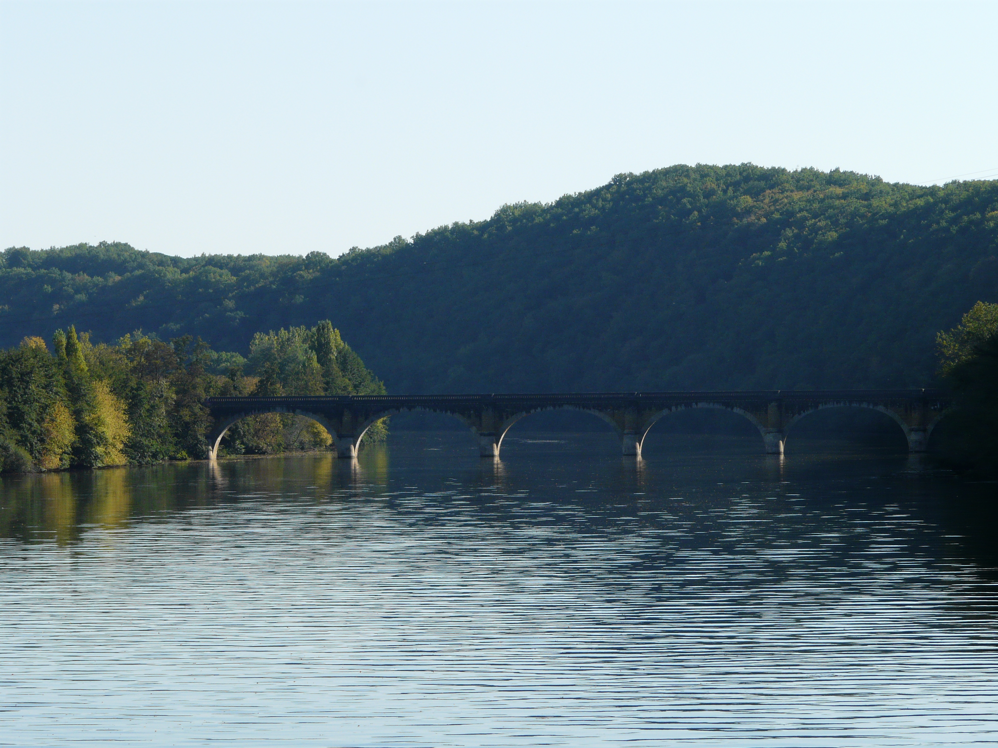 Le pont ferroviaire de Trémolat sur la Dordogne, entre Trémolat (à gauche) et Calès (à droite), Dordogne, France.